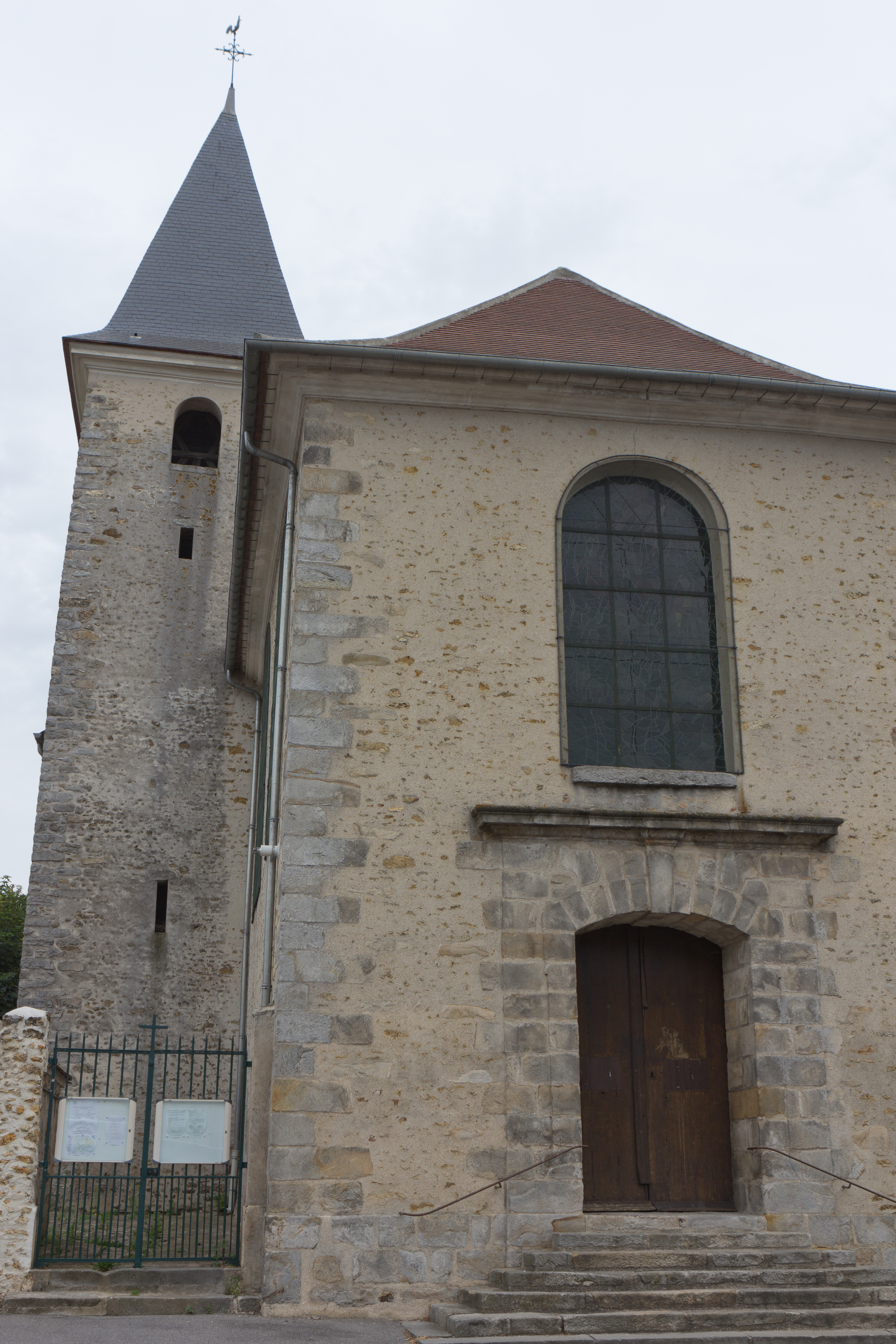 L'église de Fleury-Mérogis, commune de Fleury-Mérogis, département de l'Essonne. France.